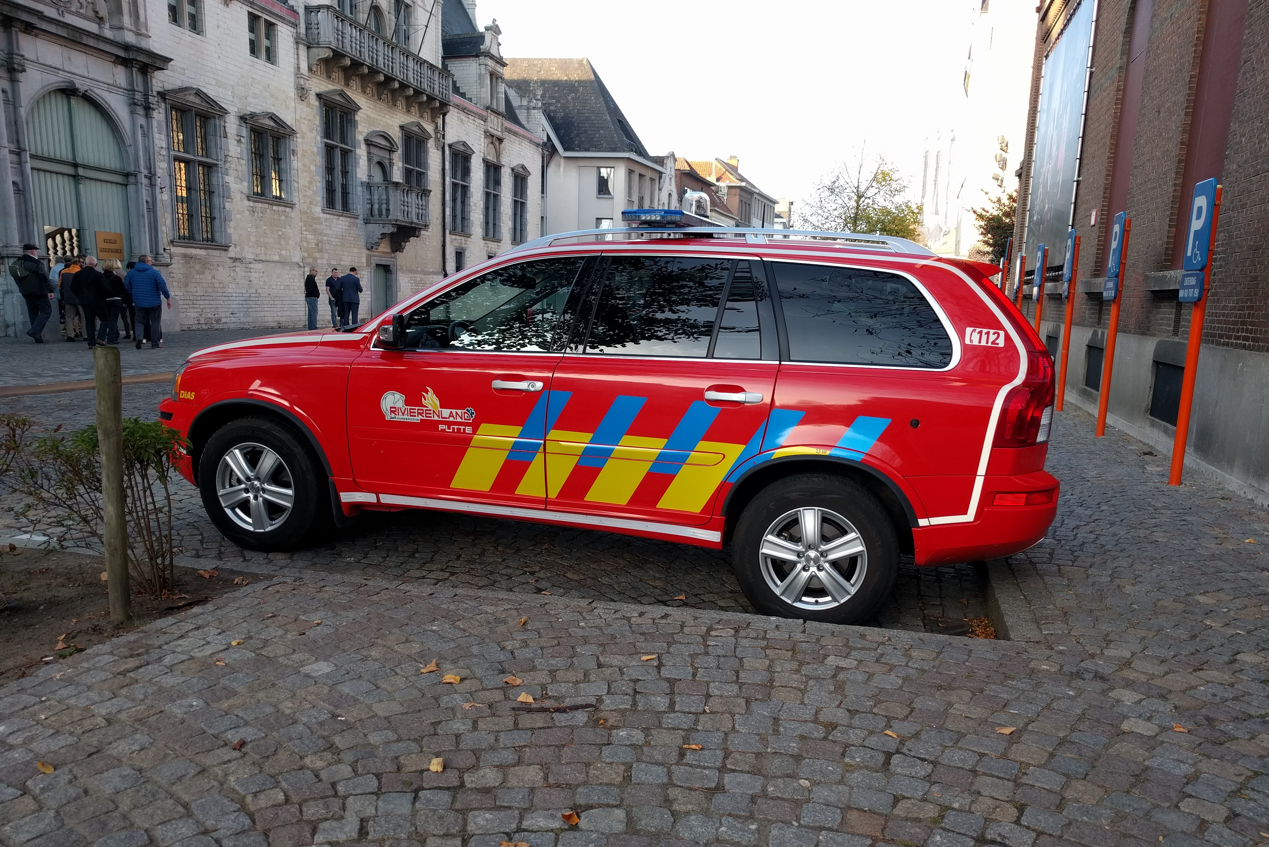 Een brandweerwagen van post Putte (hulpverleningszone Rivierenland) te Keizerstraat, Mechelen (tegenover het gerechtsgebouw daar).